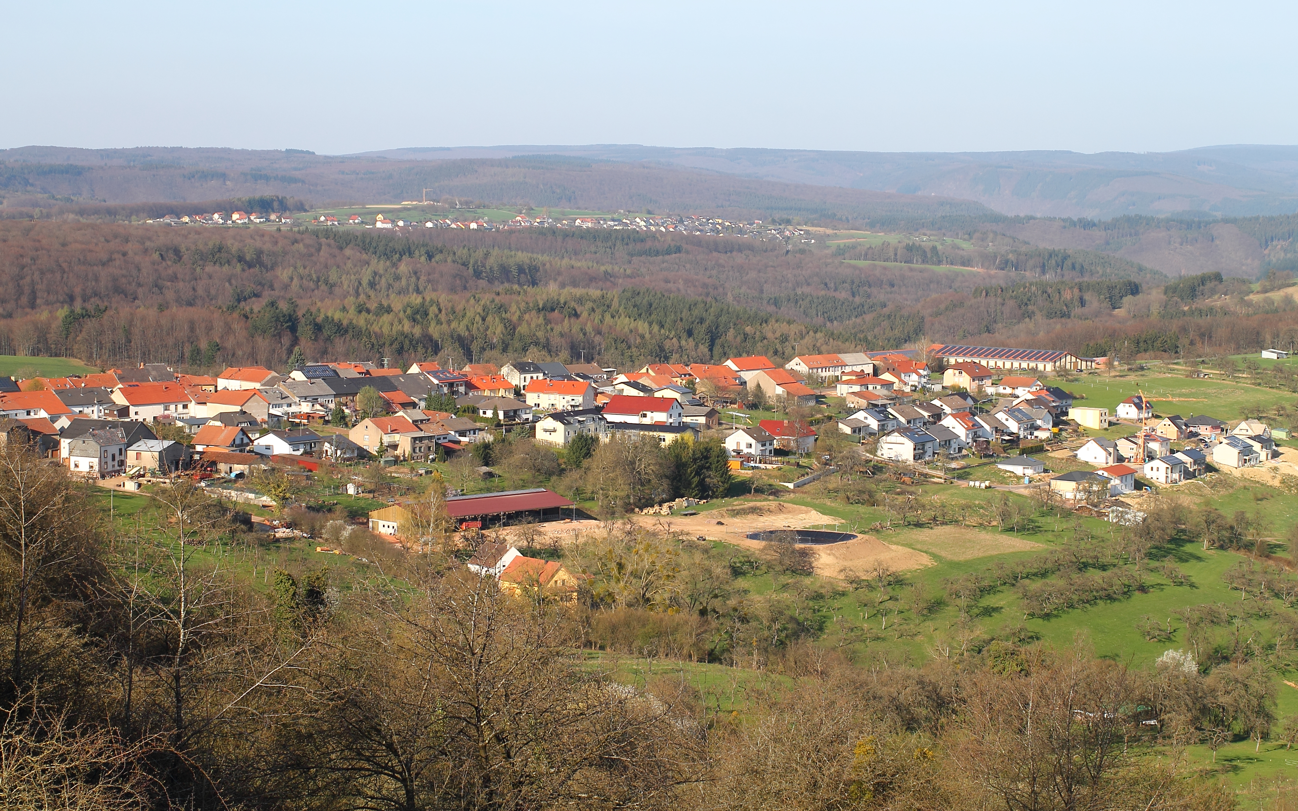 Der Mettlacher Ortsteil Wehingen aus südwestlicher Richtung vom Kewelsberg aus gesehen